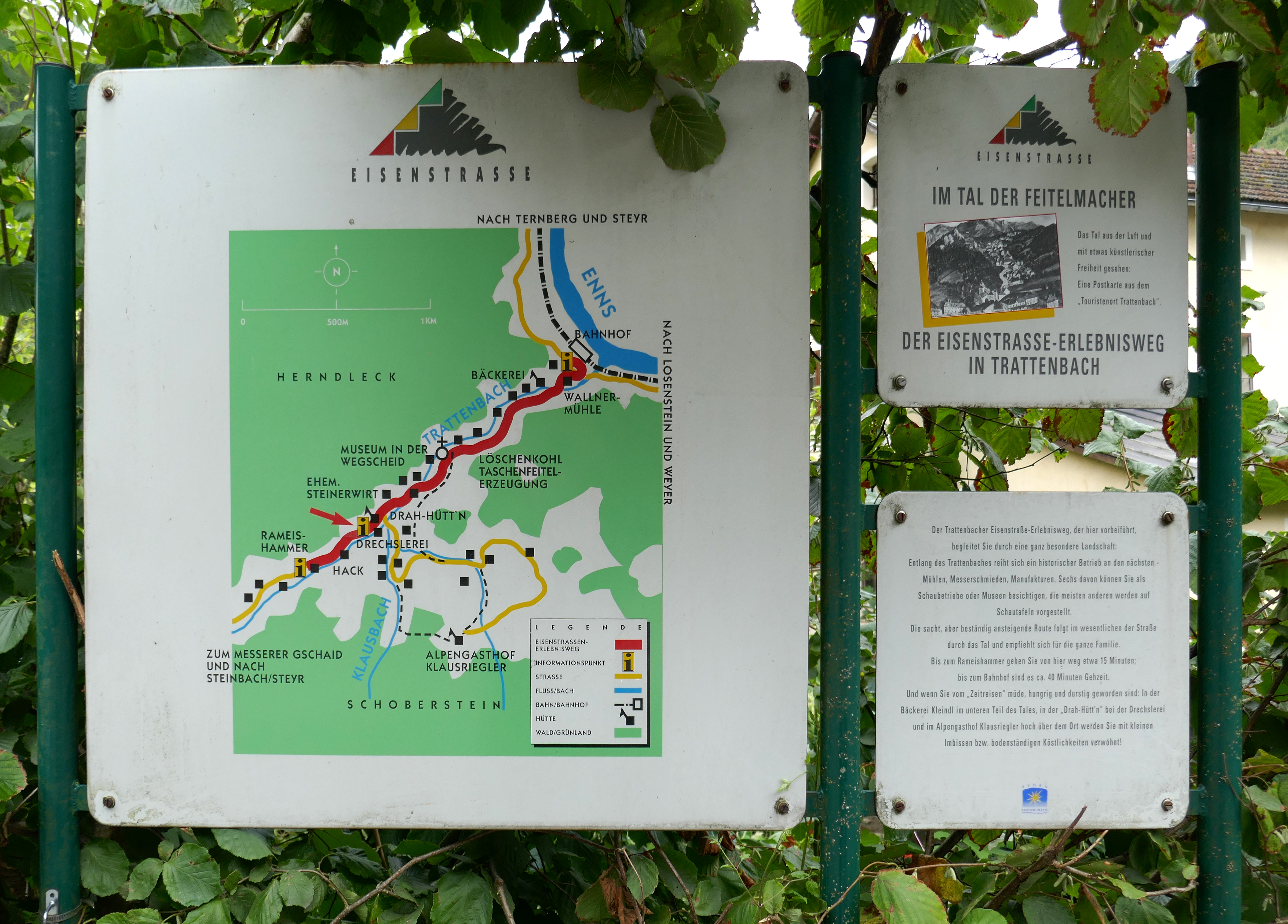 Im Tal der Feitelmacher, Trattenbach - Infotafel.